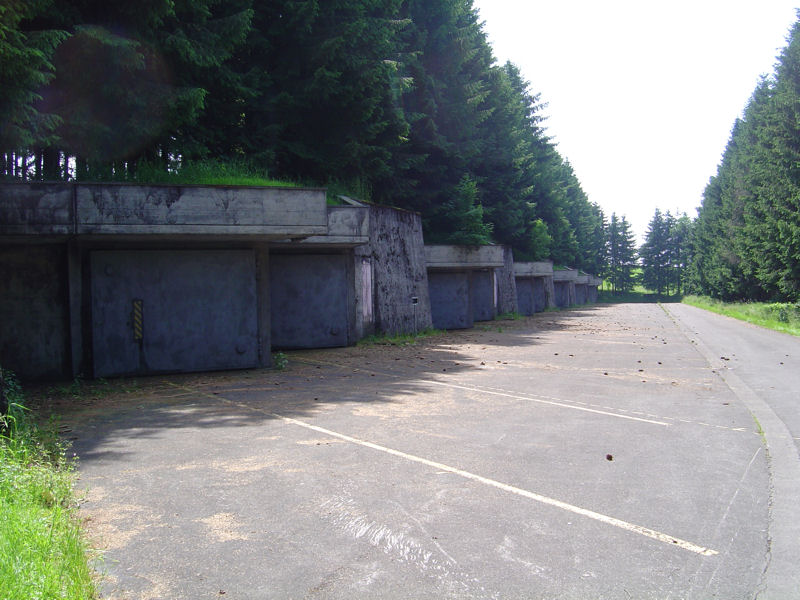 Lenkwaffengarage BL-64-ZG, Kt. Zug